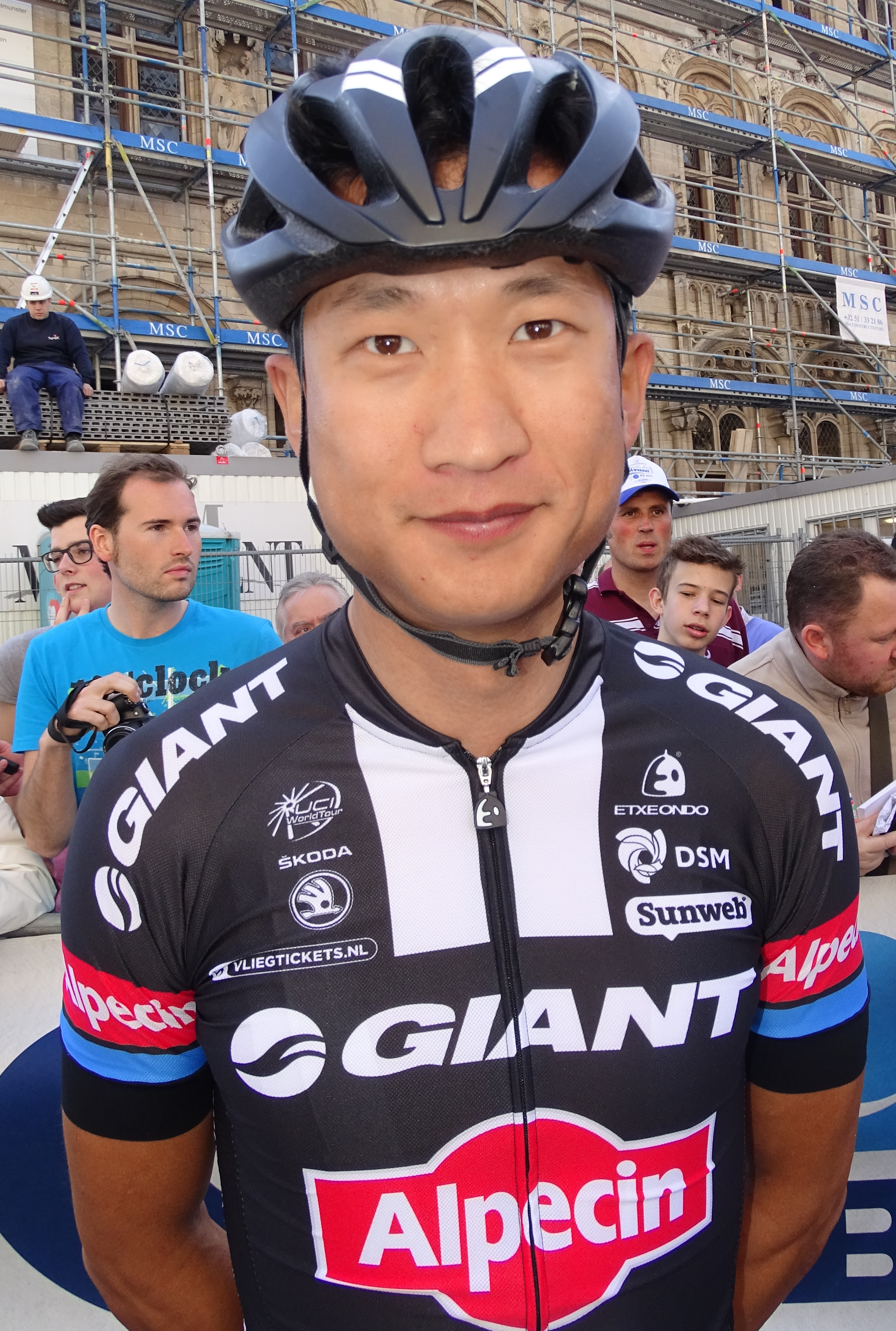 Reportage réalisé le mercredi 15 avril à l'occasion du départ de la Flèche brabançonne 2015 à Louvain, Belgique.